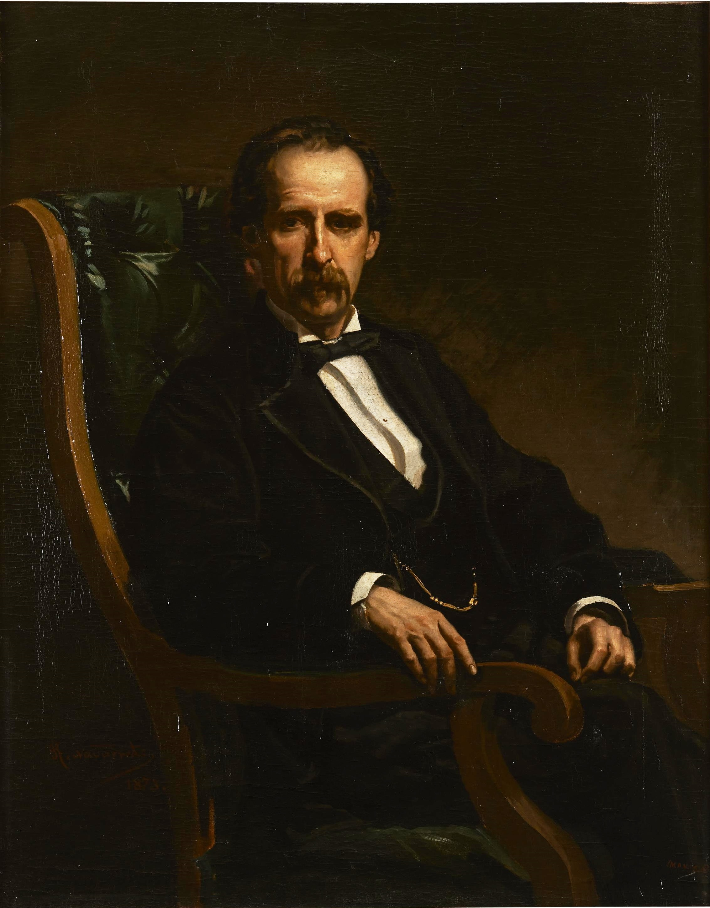 Retrato del escritor y dramaturgo español Enrique Pérez Escrich (1829-1897).